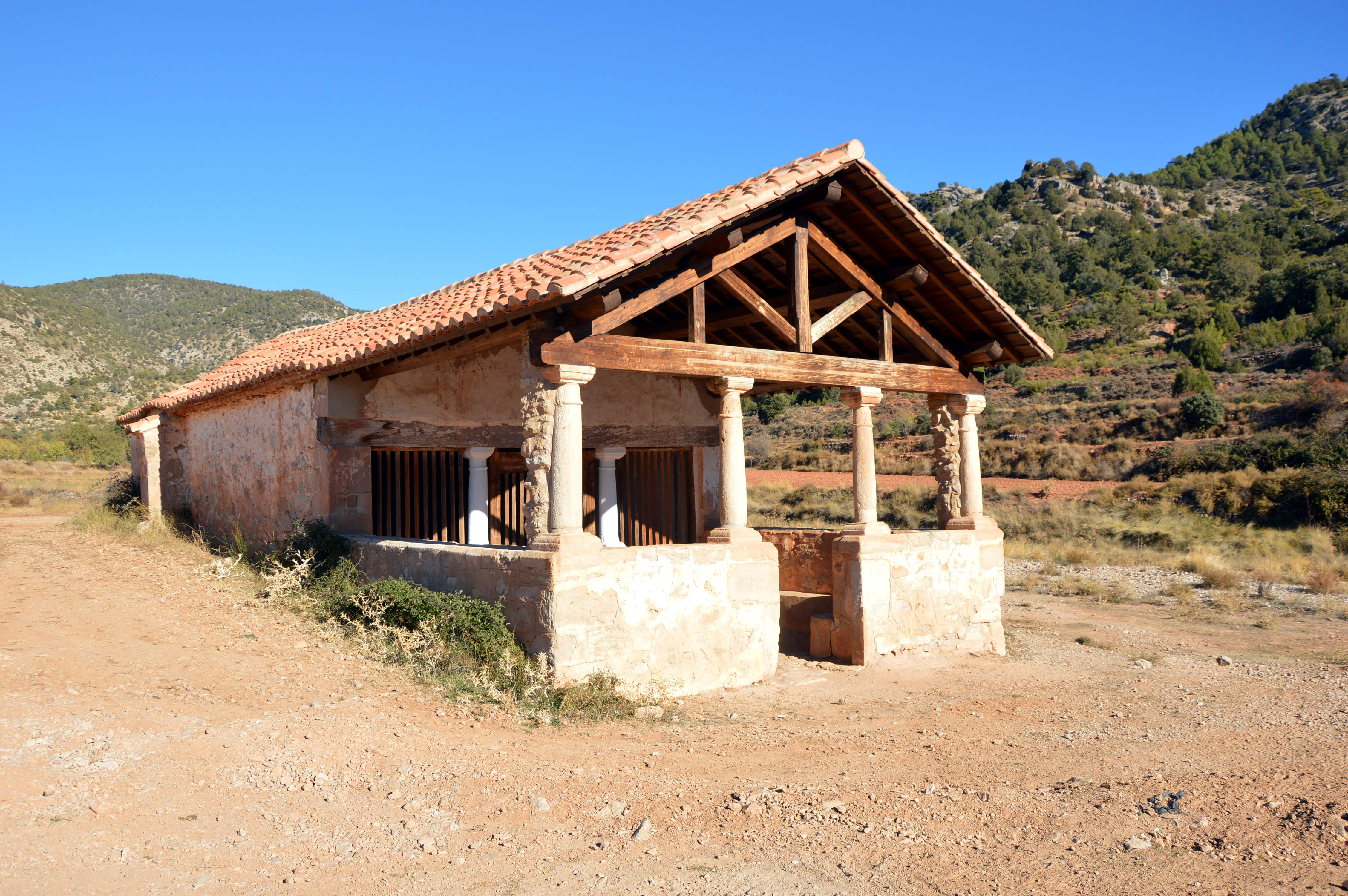 Vista general (suroriental) de la Ermita de San Roque en Puebla de San Miguel (Valencia), con detalle del atrio exterior (2017).